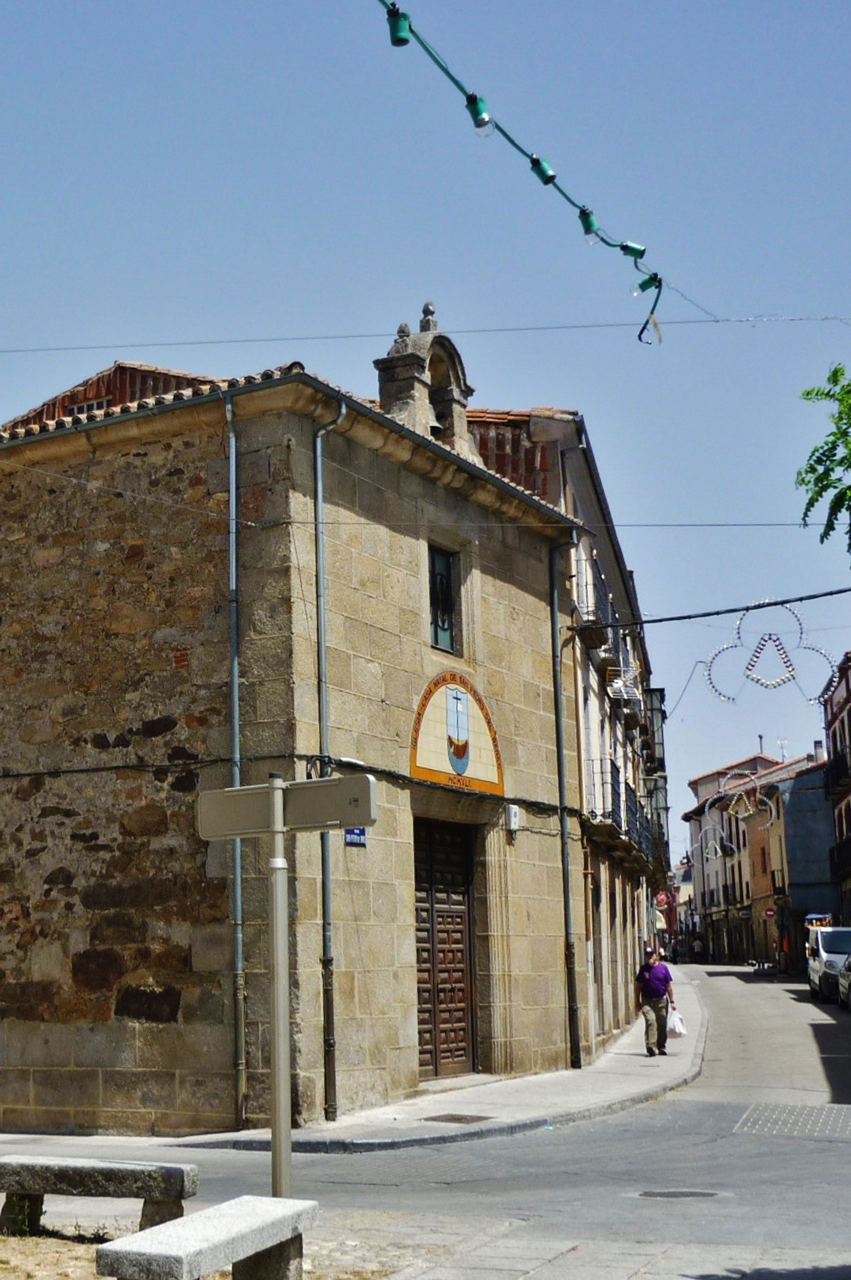 Ermita de San Pedro del Barco, El Barco de Ávila, Castilla y León, España